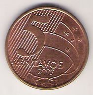 Frente da moeda de 5 centavos da segunda geração. Cunhada em 2009. This graphic was created with GIMP.